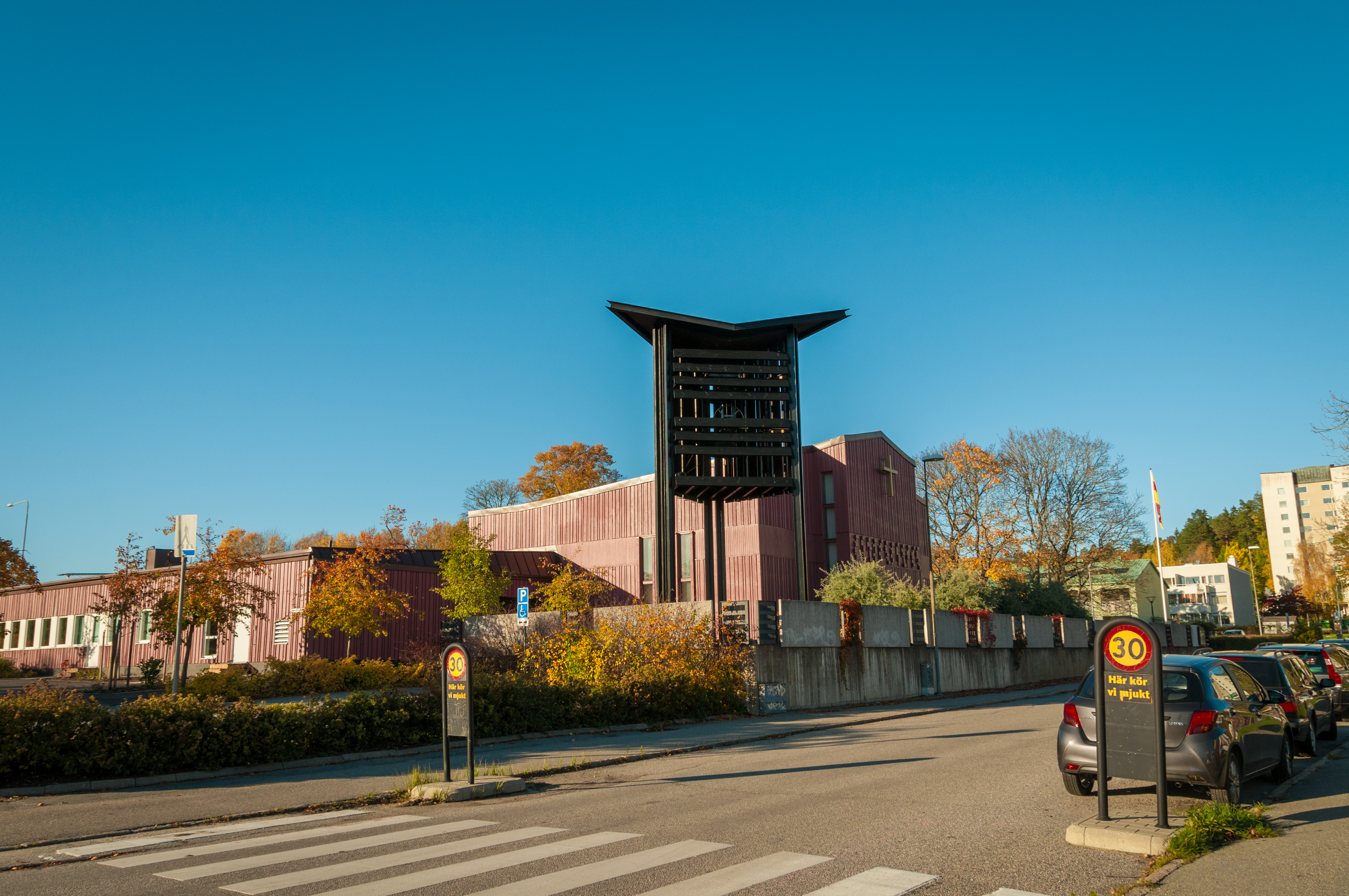 Tumba kyrka och dess kyrktorn hösten 2017